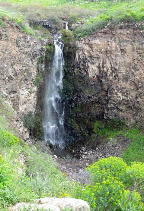 המפל הגבוה בישראל, בשמורת גמלא